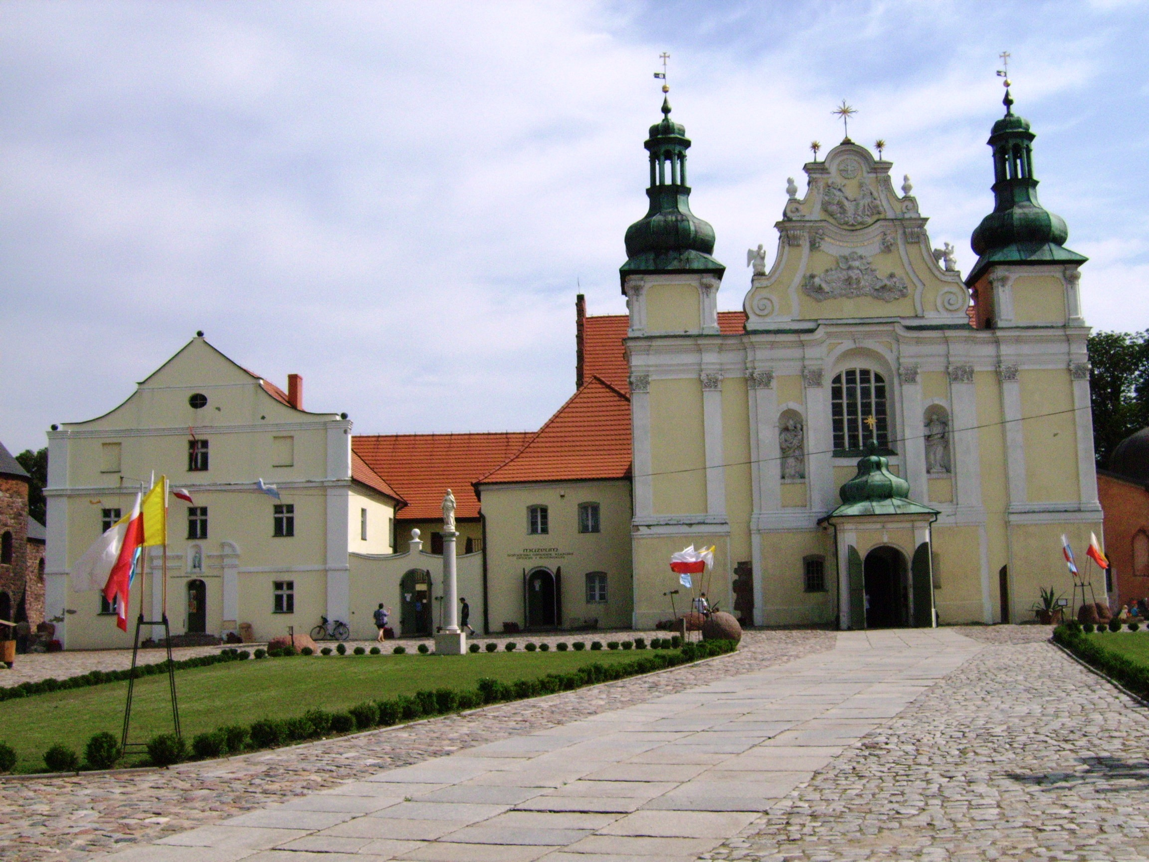 Strzelno - kościół norbertanek (zabytek nr rejestr. A/827)